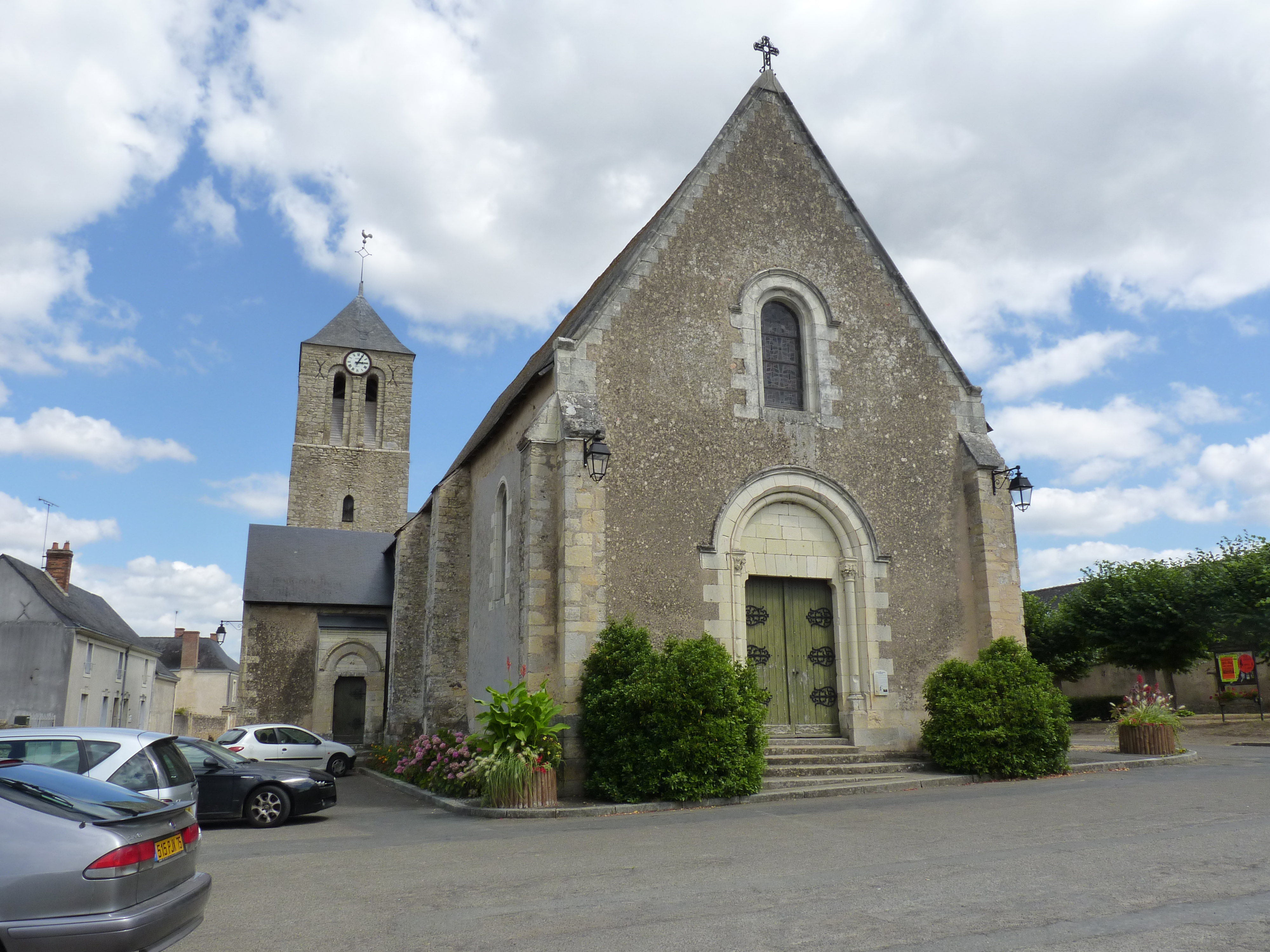 Sarthe - Cré-sur-Loir - Eglise